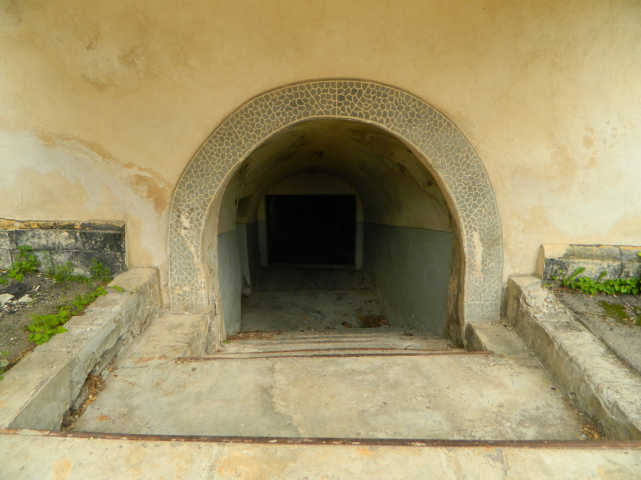 Pivniță 02